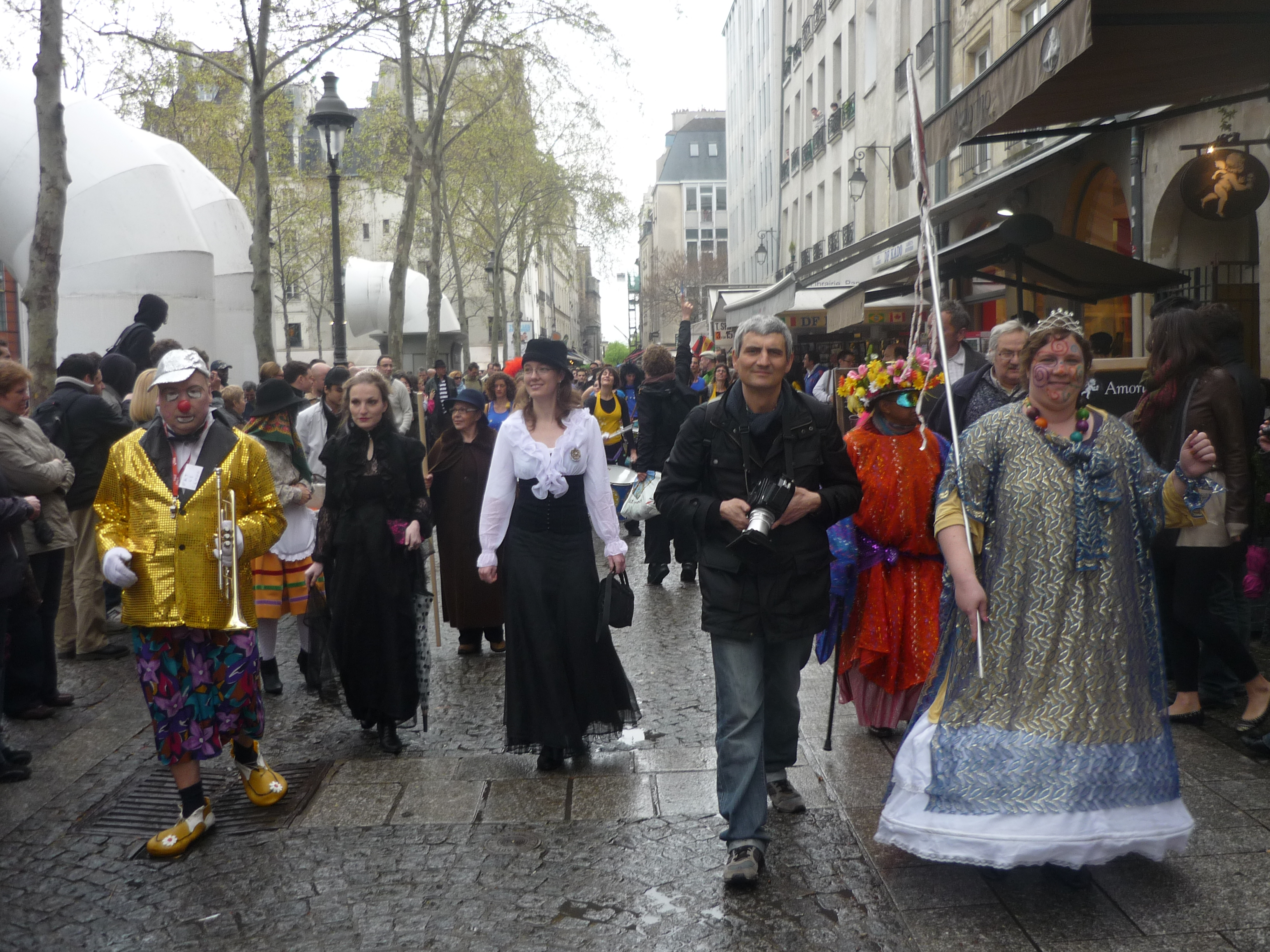 Le cortège du Carnaval des Femmes, Fête des Blanchisseuses de la Mi-Carême 2011 passe rue Saint-Martin en longeant le parvis du Centre Pompidou à Paris. A gauche, avec la trompette : Pat le Clown. A droite : Alexandra Bristiel, Présidente du Carnaval de Paris et du Carnaval des Femmes de Paris.